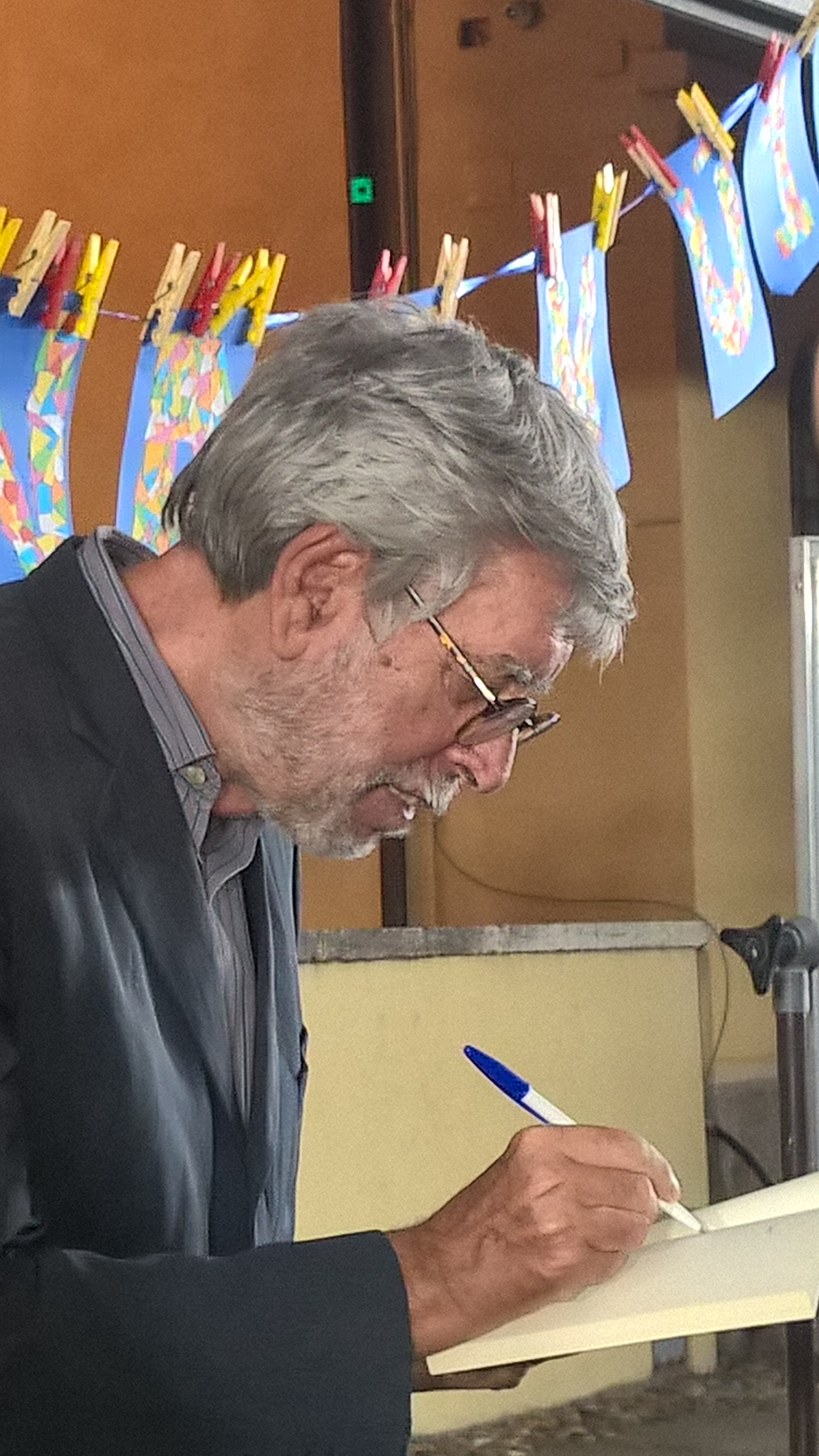 Domenico Starnone firma autografi dopo l'intervista dei volontari del Festivaletteratura di Mantova (Blurandevù) in Piazza Leon Battista Alberti, venerdì 8 settembre 2017.